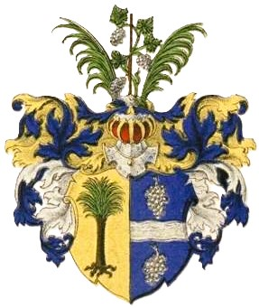 Palmenbachi suguvõsa aadlivapp